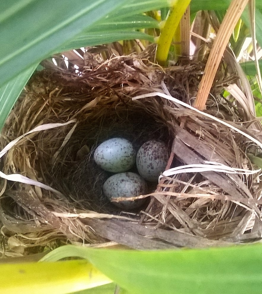 Nido con tres huevos de pajaro Copetón, en Bogota Colombia.